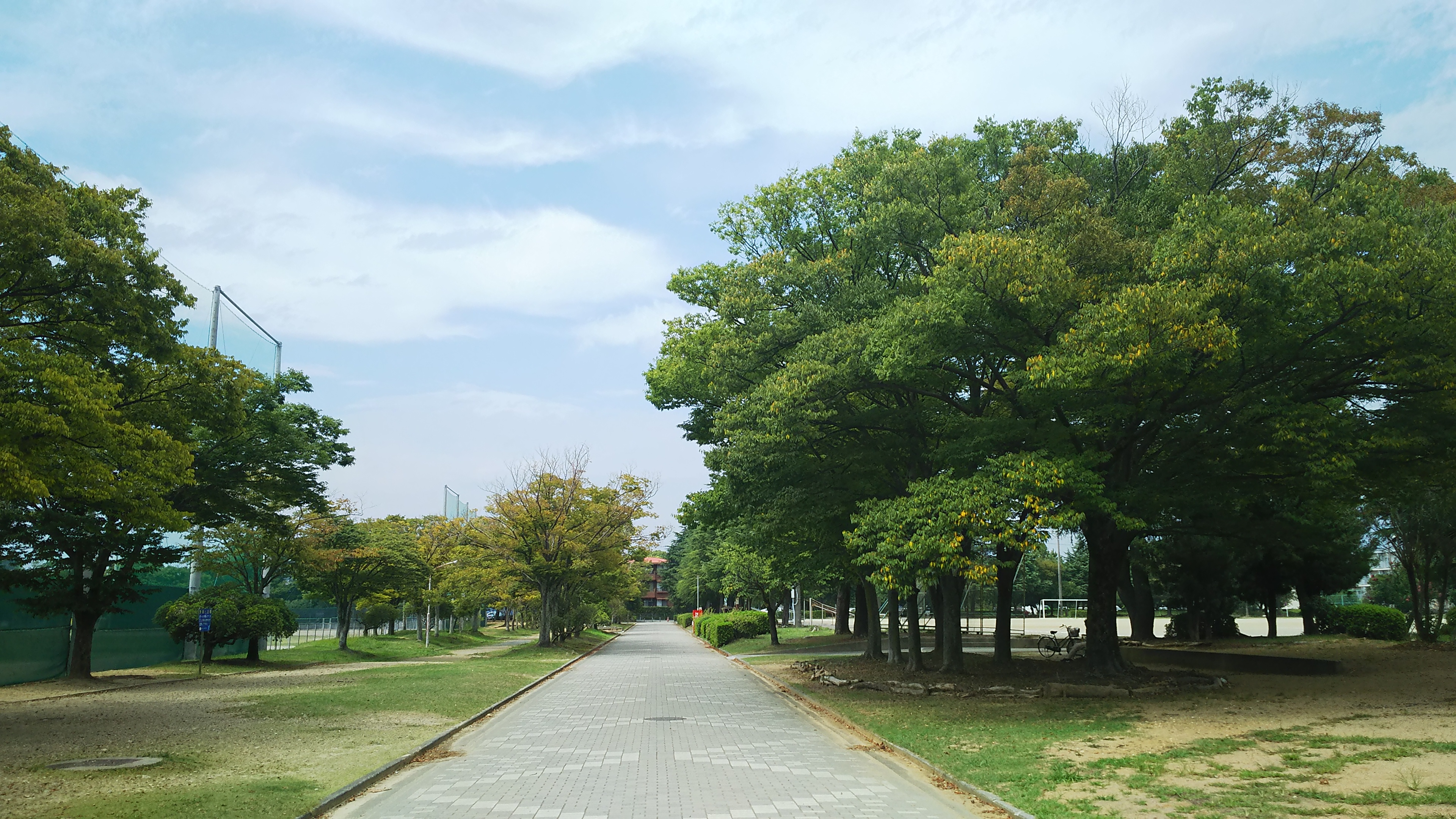 浜松市中区の和地山公園。